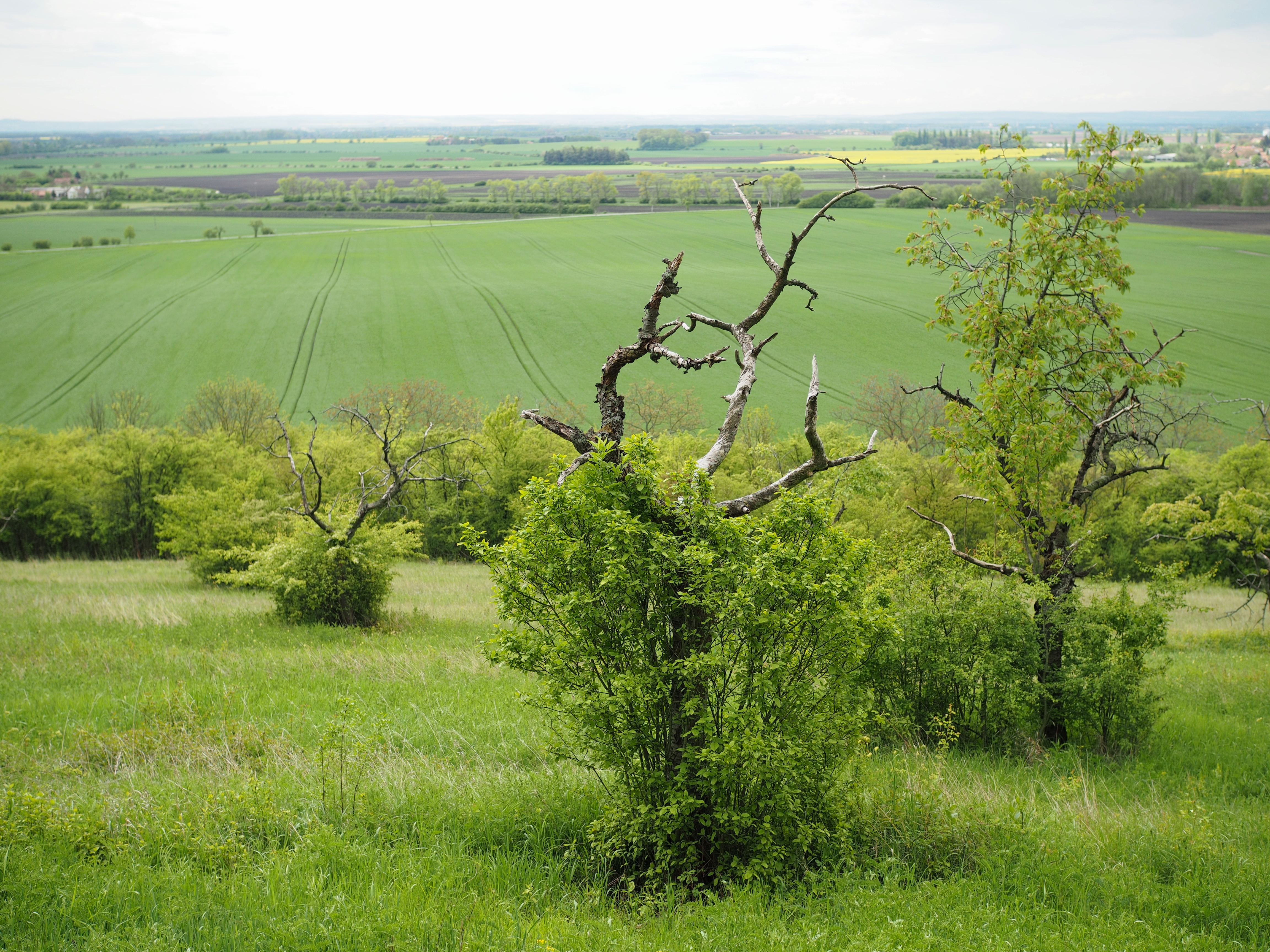 Přírodní památka Chotuc (Natural monument Chotuc) Project: Chráněná území.